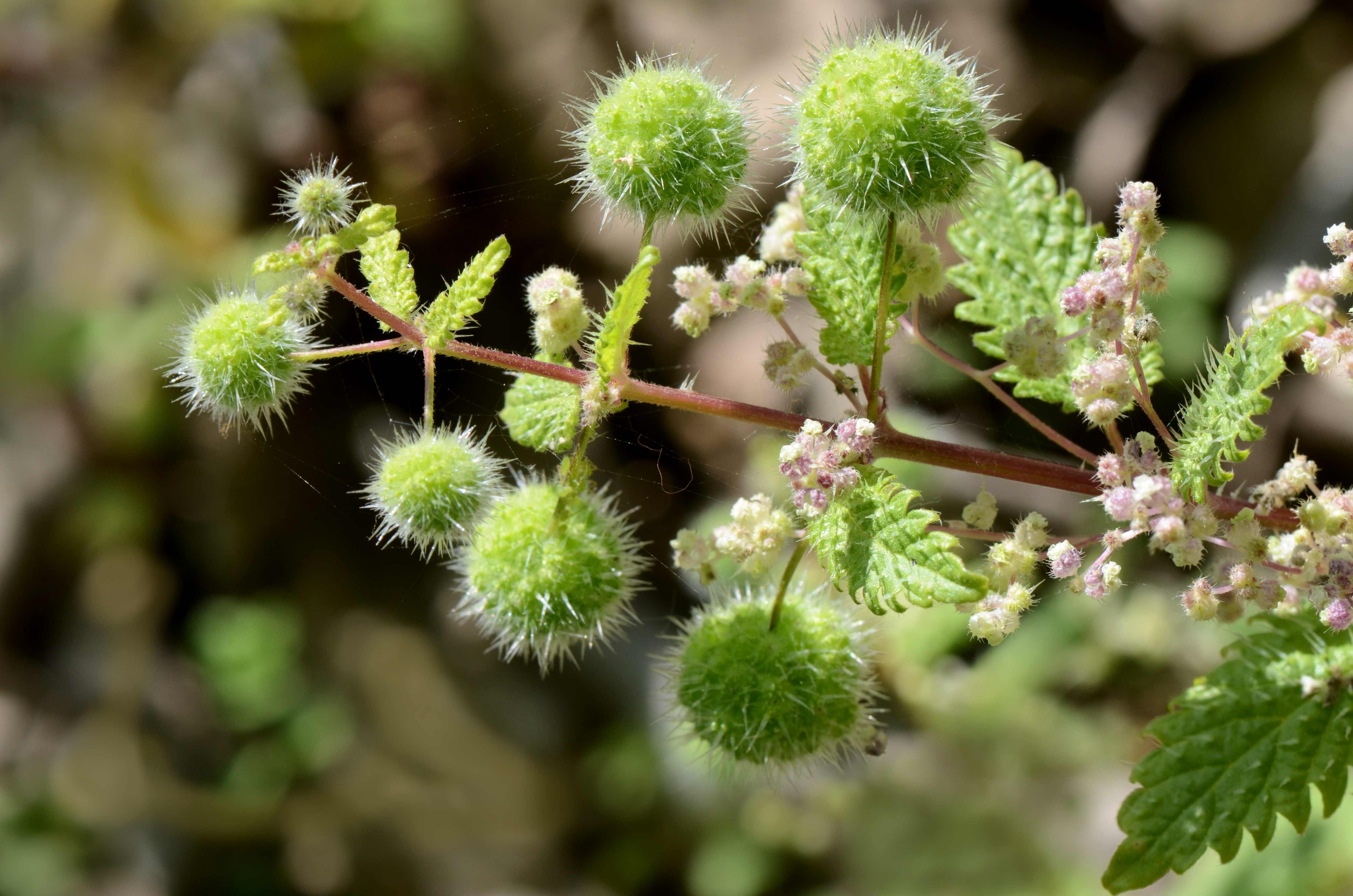 Urtica pilulifera, inflorescences, glomérules de fleurs femelles, grappes de fleurs mâles